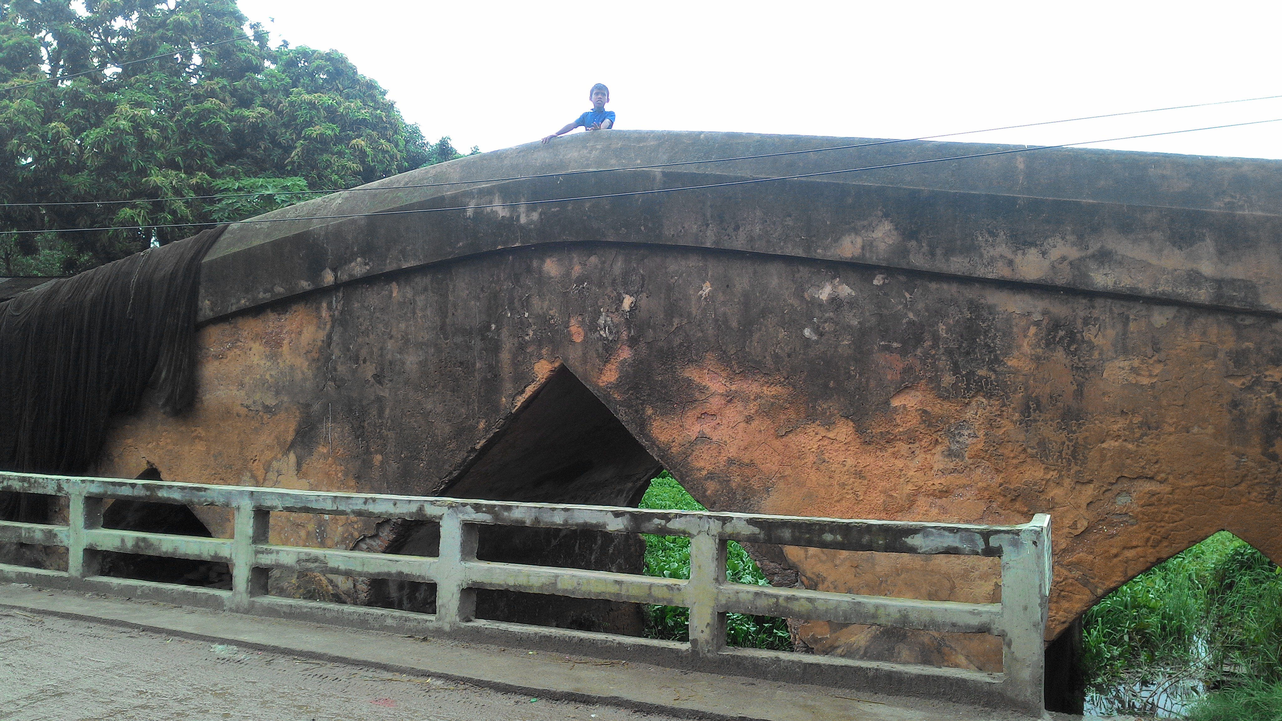 পানাম সেতু